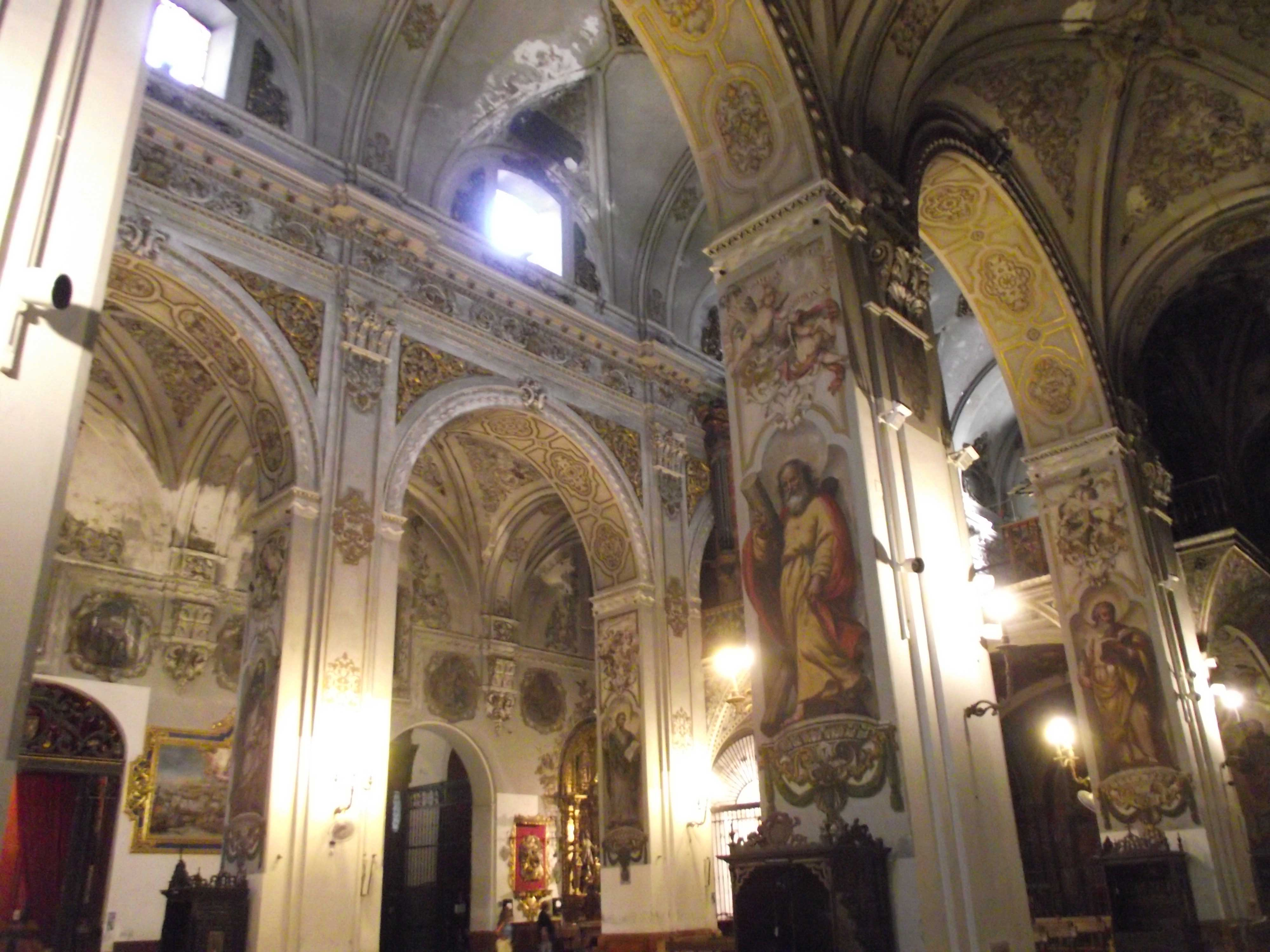 Sevilla, Iglesia de Santa María Magdalena, 1694-1724